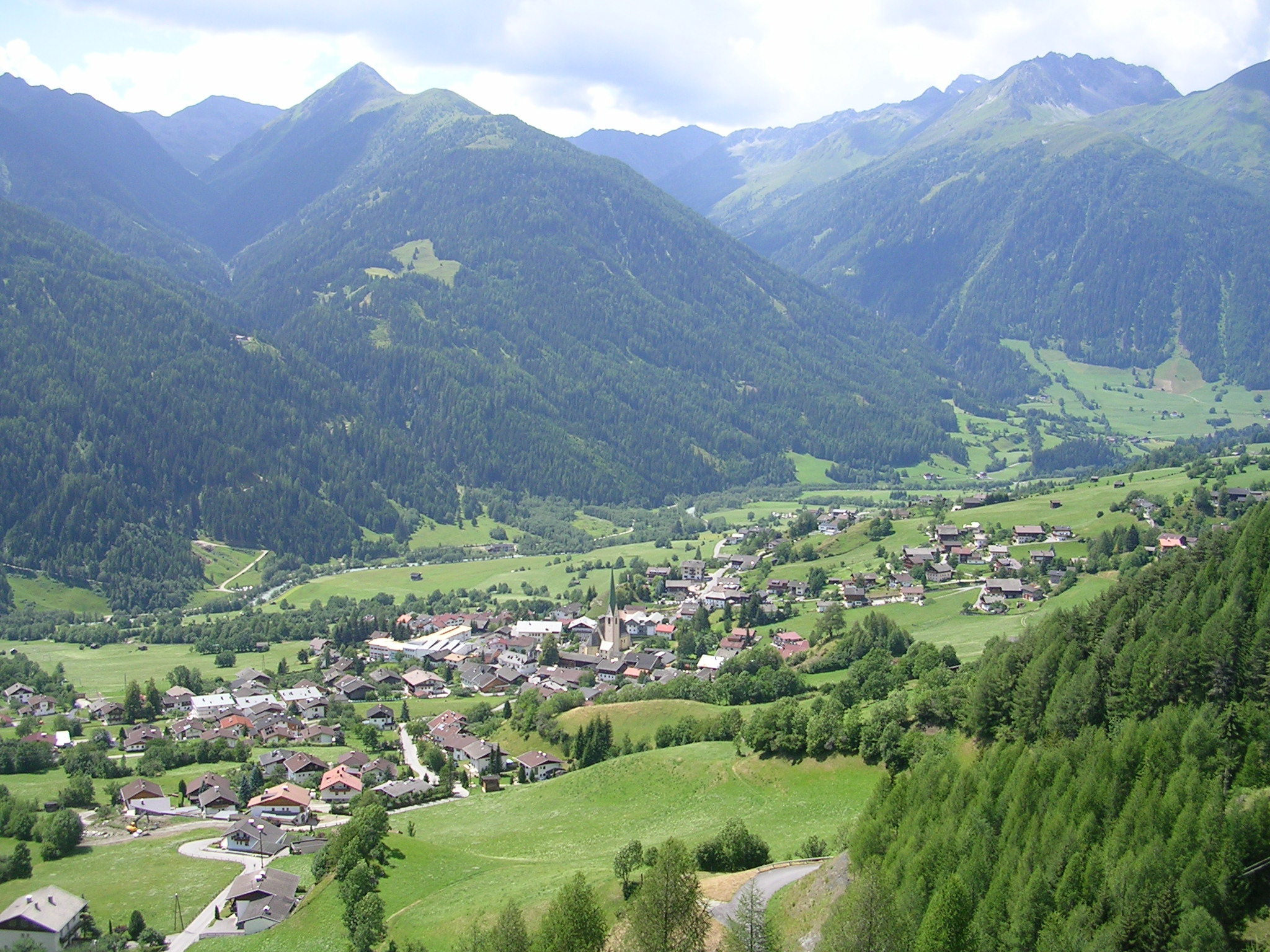 Gemeinde Virgen, Blick ins Virgental zwischen Fratnikbach und Steinkaasbach von der Burgruine Rabenstein. Im Zentrum die Fraktion Virgen-Dorf mit Pfarrkirche, im Hintergrund die Isel und Göriach